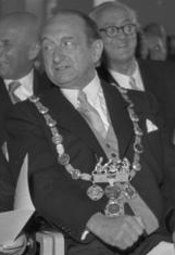 Einweihung des wiederaufgebauten Gürzenich